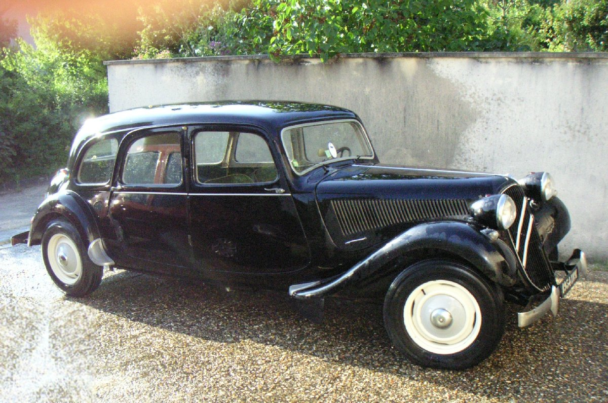 Traction avant carosserie 6 glaces, familiale. Modèle 1954. Une rangée de 3 strapontins permet le transport de 9 personnes au total. Moteur 4 cylindres.